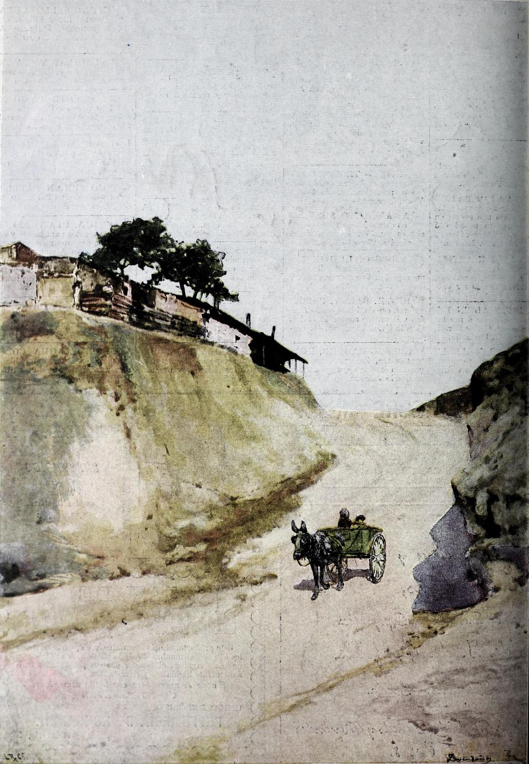 Afueras de Madrid. Cuesta de Areneros.